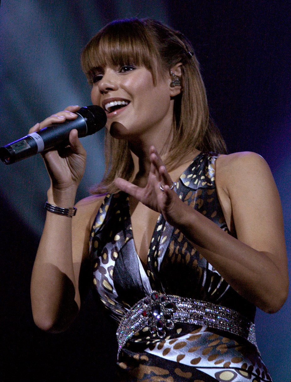 Francine Jordi beim 2. Jubiläumsfest der Volksmusik Superstars in der Wiener Stadthalle.